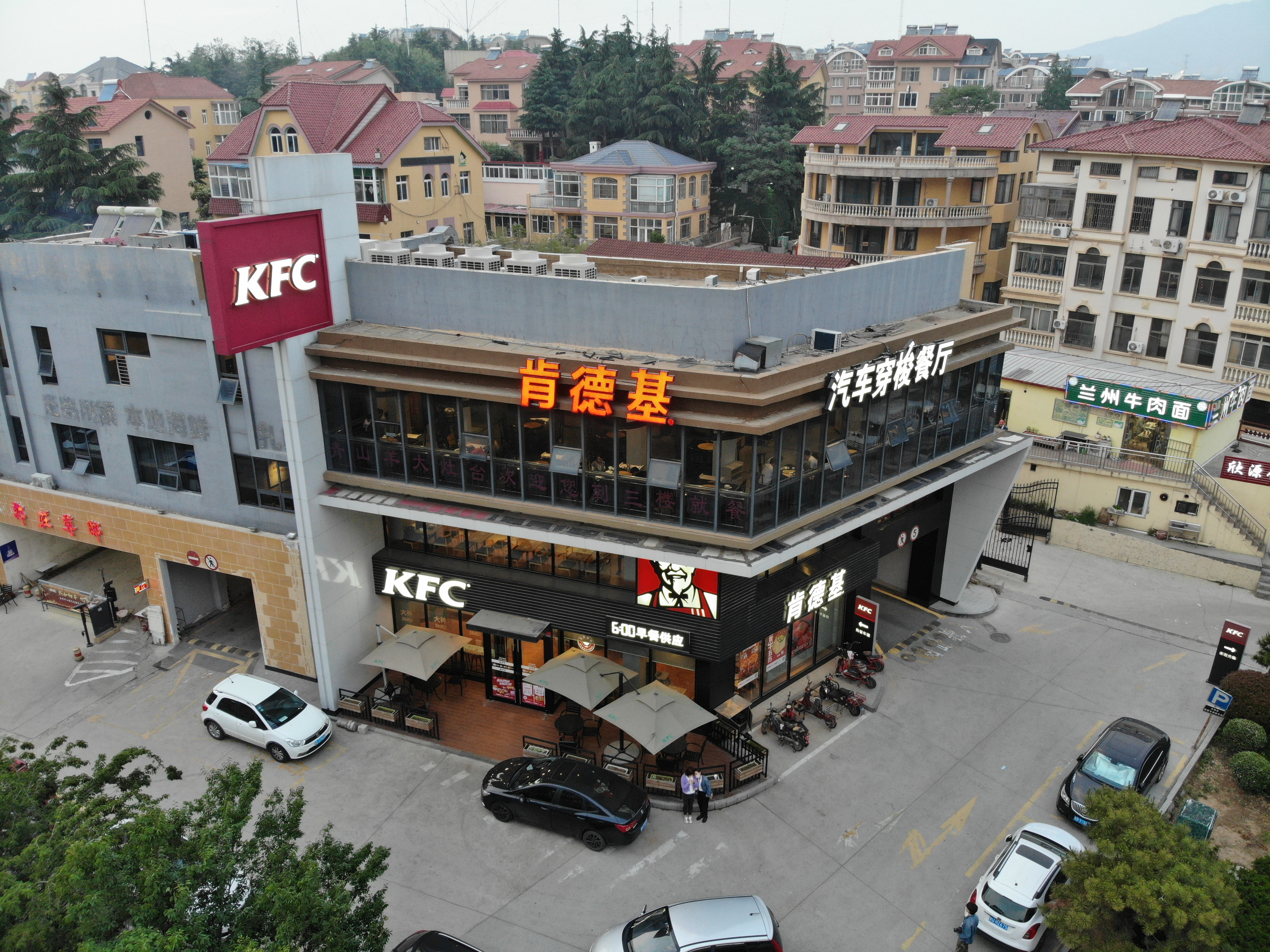 青岛肯德基(郑庄DT店)